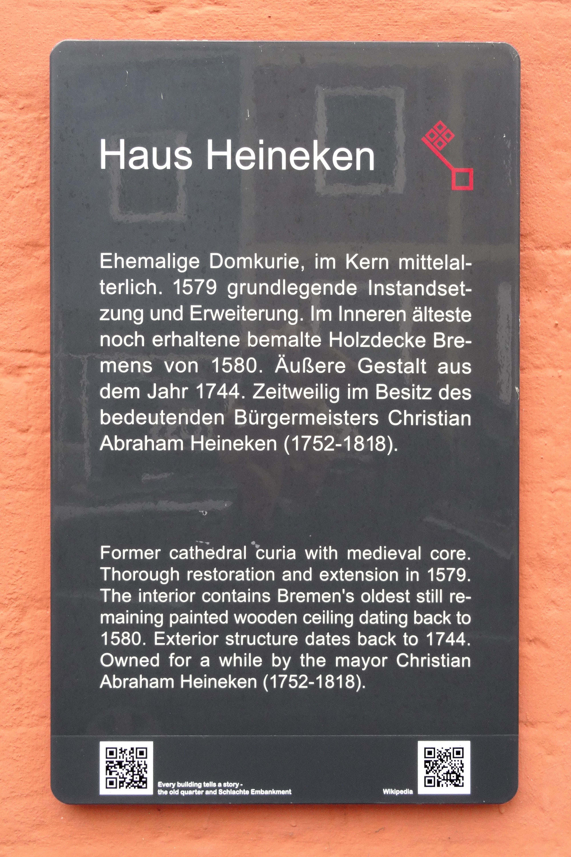 Infotafel mit QR- und QRpedia-Code: Haus Heineken